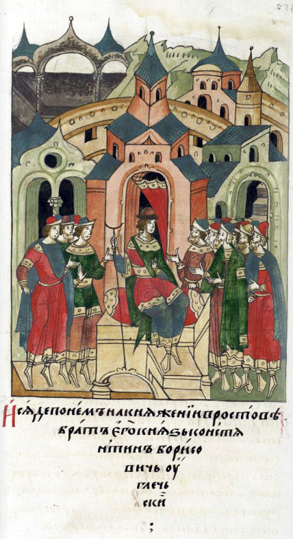 ЛИЦЕВОЙ ЛЕТОПИСНЫЙ СВОД И сел после него на княжение в Ростове брат его, князь Константин Борисович Угличский.